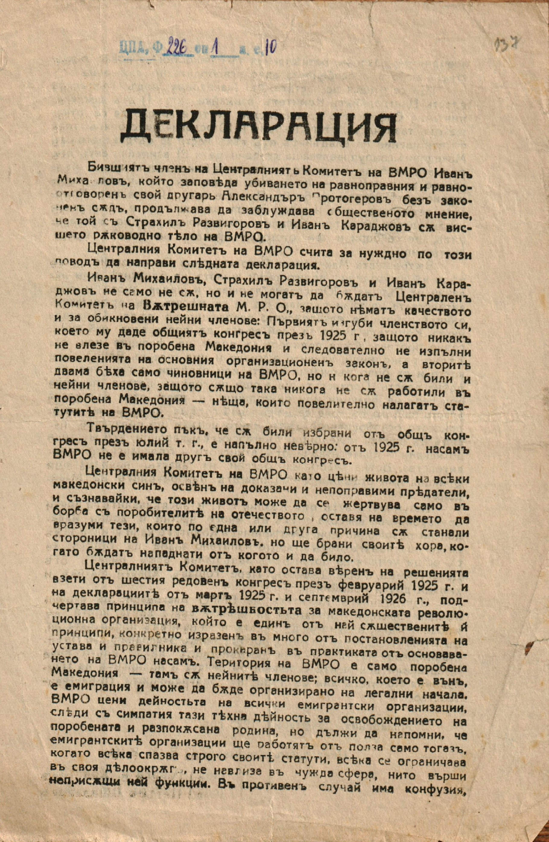 Доклади, изложения, декларации, писма и др. на ВМРО за организационното състояние, характера и дейността на организацията